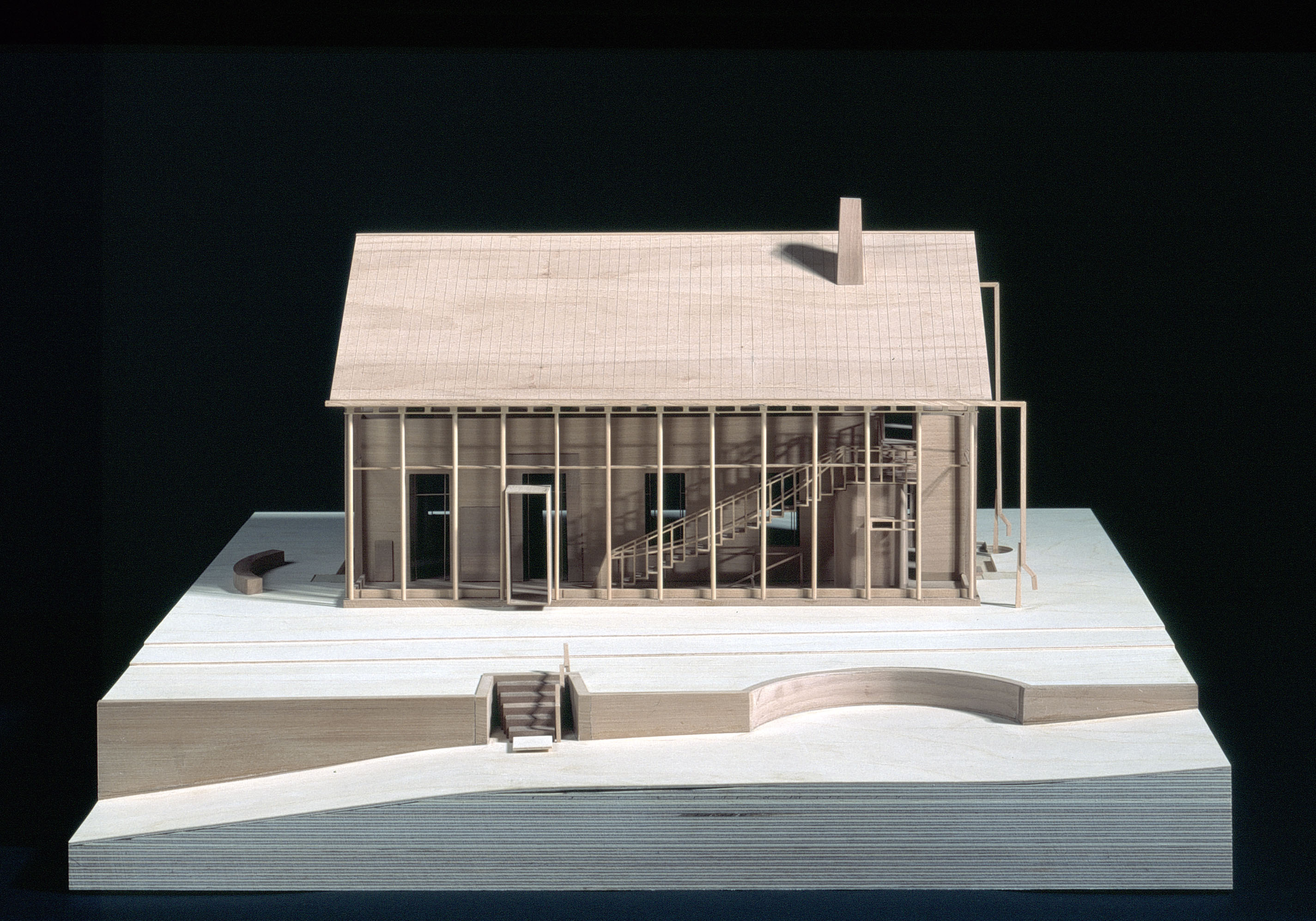 Haus Babanek. Modell 1999, TU Dortmund